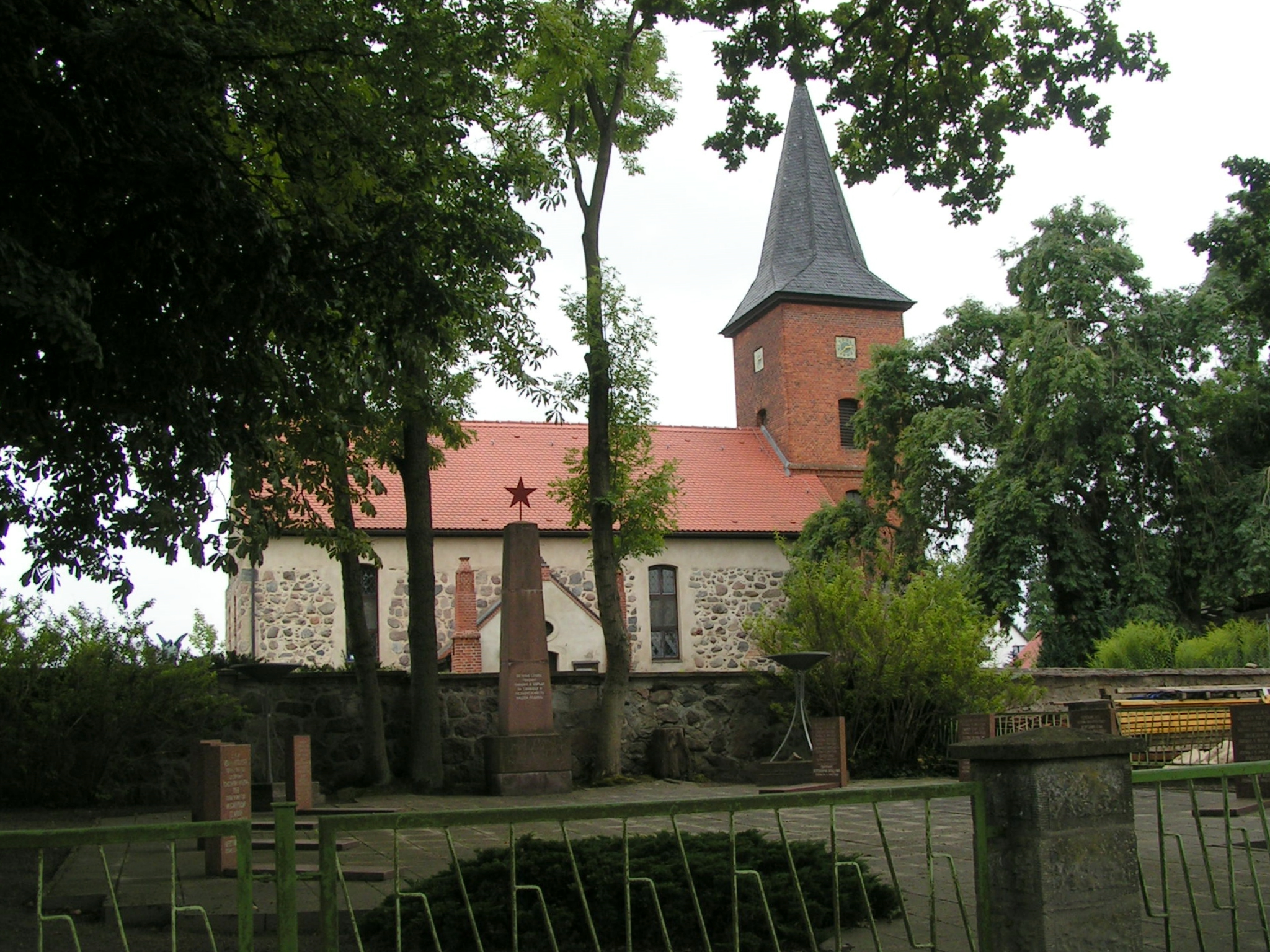 Kirche in Schönermark (Land Ruppin) mit sowjetischem Soldatenfriedhof